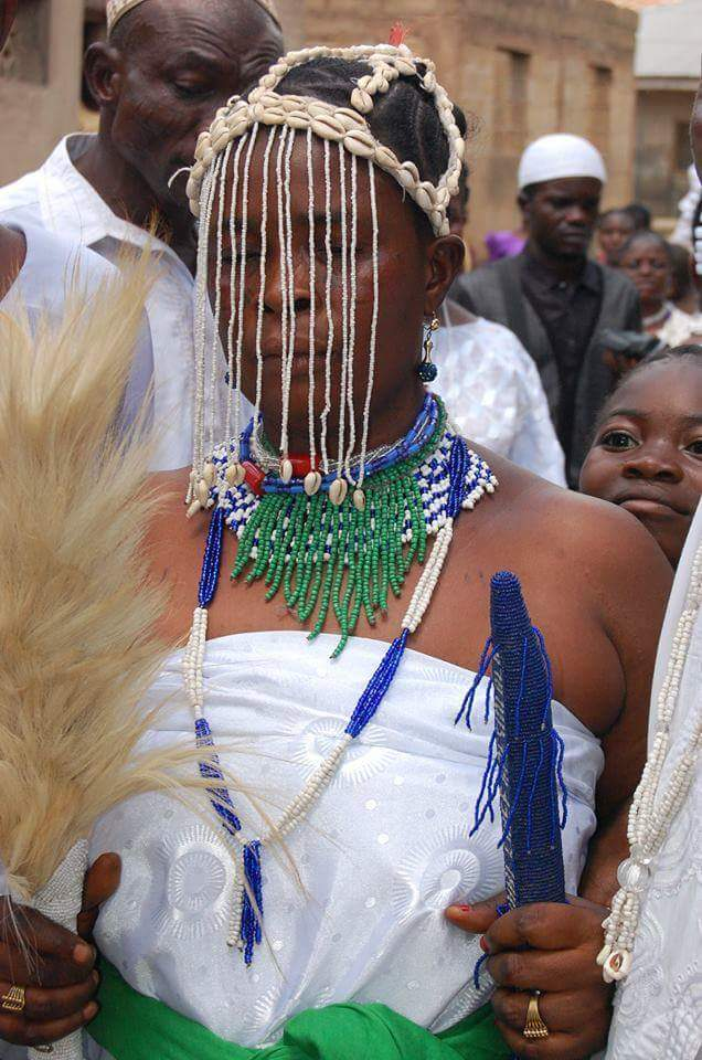 Yemojá manifesta em sua Elegun no festival de Abeokutá, em Nigéria.